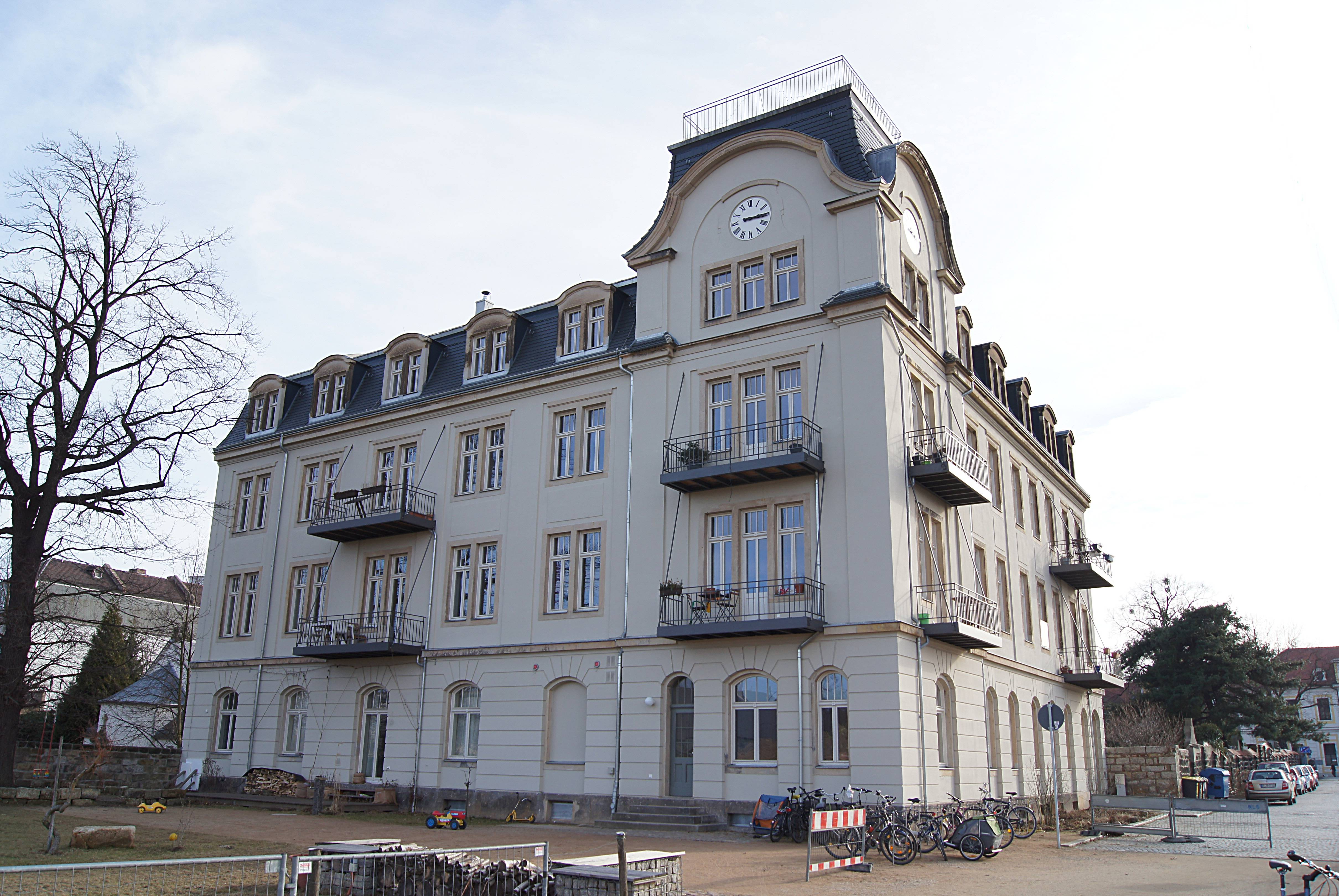 ehem. Hefe- u. Spirituosenfabrik Bramsch, Verw.- u. Wohnbauten; Friedrichstraße 56